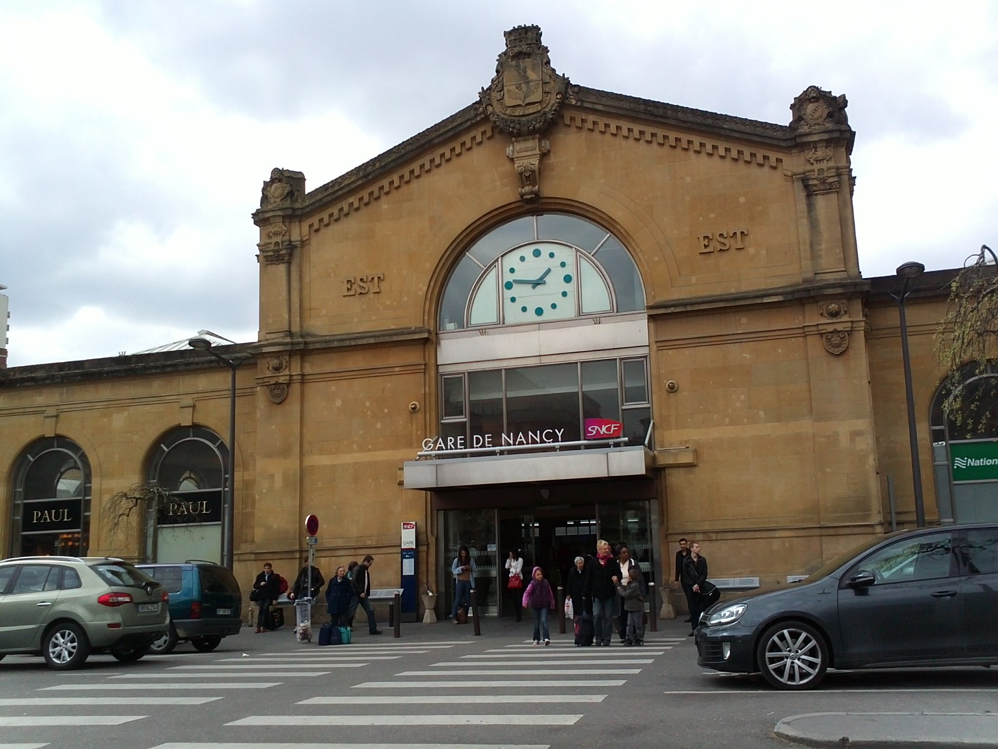 Gare de Nancy-Ville